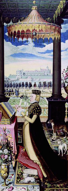 Porträt Dorotheas von Dänemark, Herzogin von Braunschweig-Lüneburg, auf dem rechten Altarflügel in der Celler Schlosskapelle